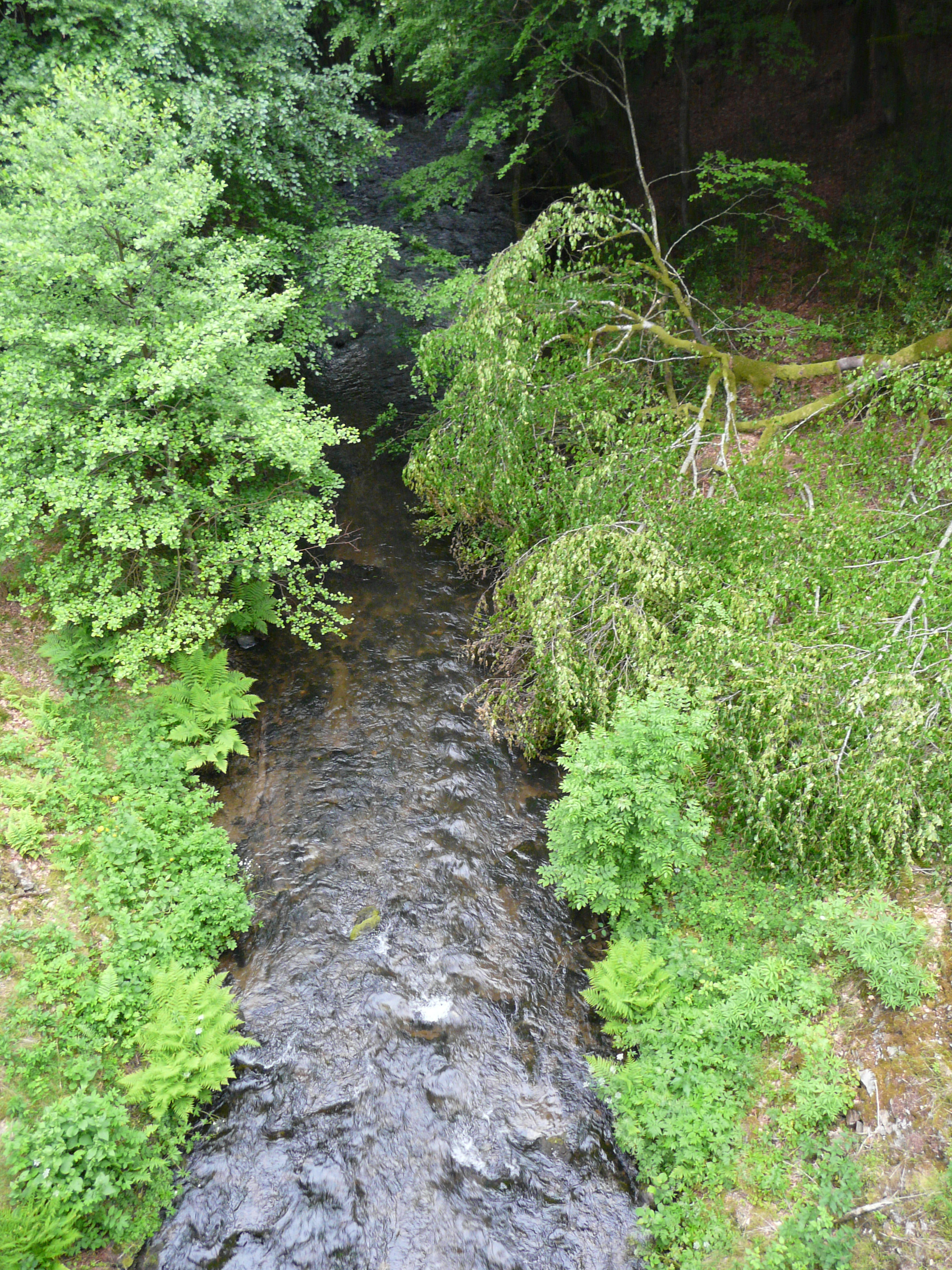 La Clidane, en aval du pont de la route départementale 602, marque la limite entre les communes de Saint-Julien-Puy-Lavèze (à gauche) et Saint-Sulpice (à droite), Puy-de-Dôme, France.